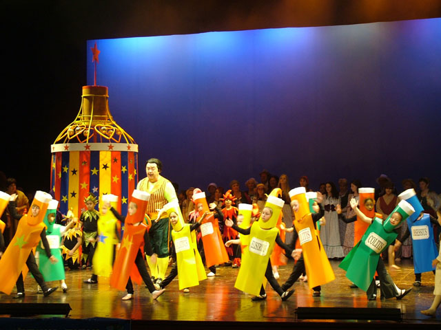 האופרה שיקוי האהבה